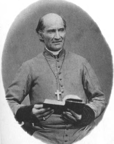 Portrait de Louis Amédée Rappe, premier évêque de Cleveland